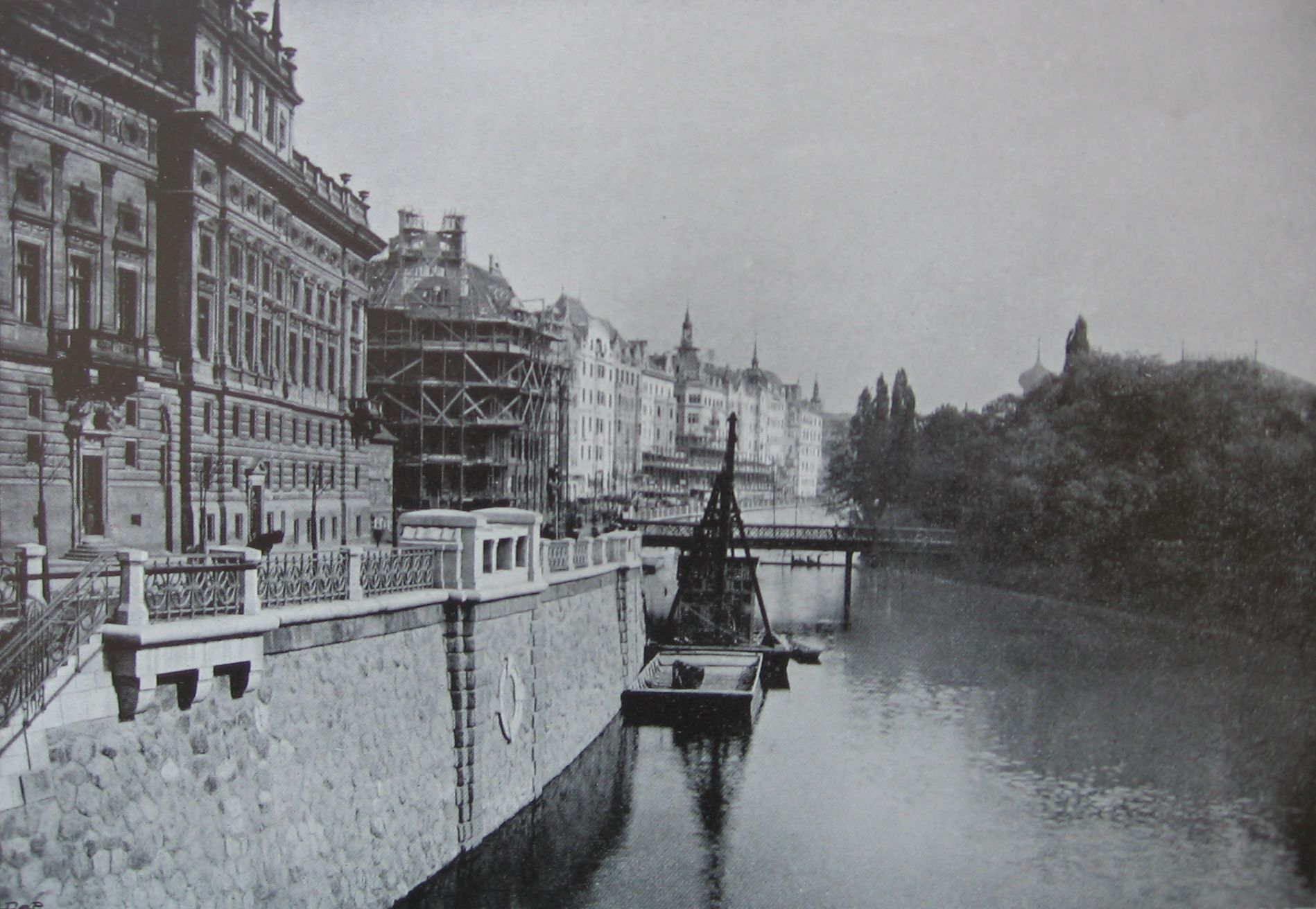 Riegrovo nábřeží a Slovanský ostrov v roce 1905 Původní popisek v časopise Český svět: „Riegrovo nábřeží v Praze — stav koncem května 1905 Pohled z Františkova mostu“